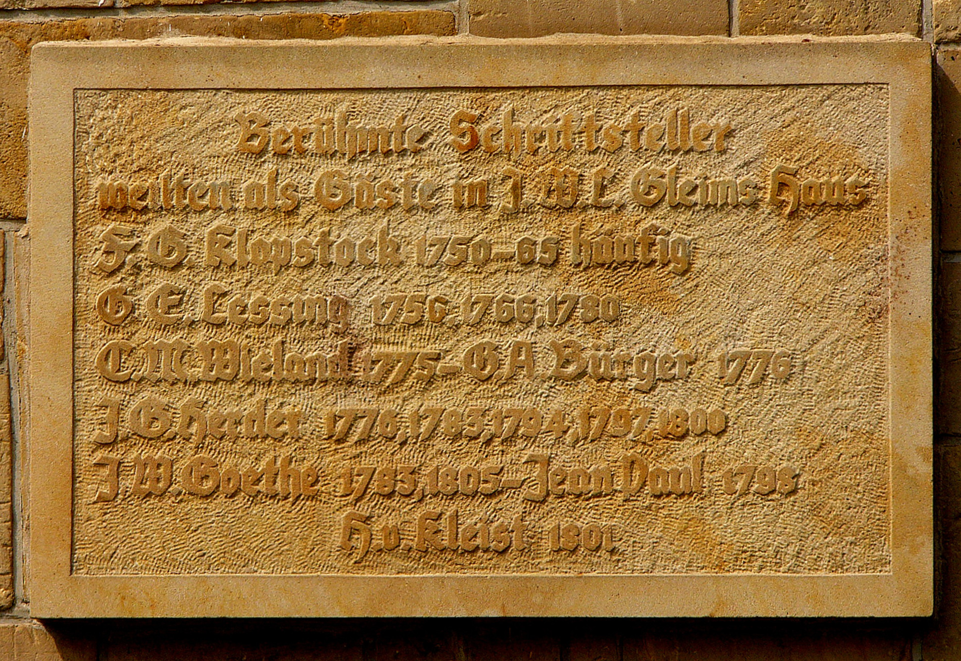 Gedenktafel am Gleim-Haus in Halberstadt.